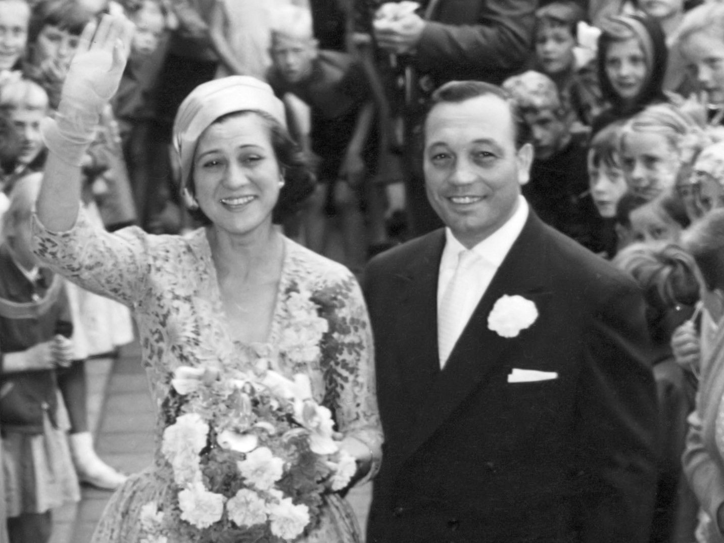 Huwelijk van Elly Strassburger van Circus Strassburger met dompteur Harry Belli in Hilversum 15 augustus 1957